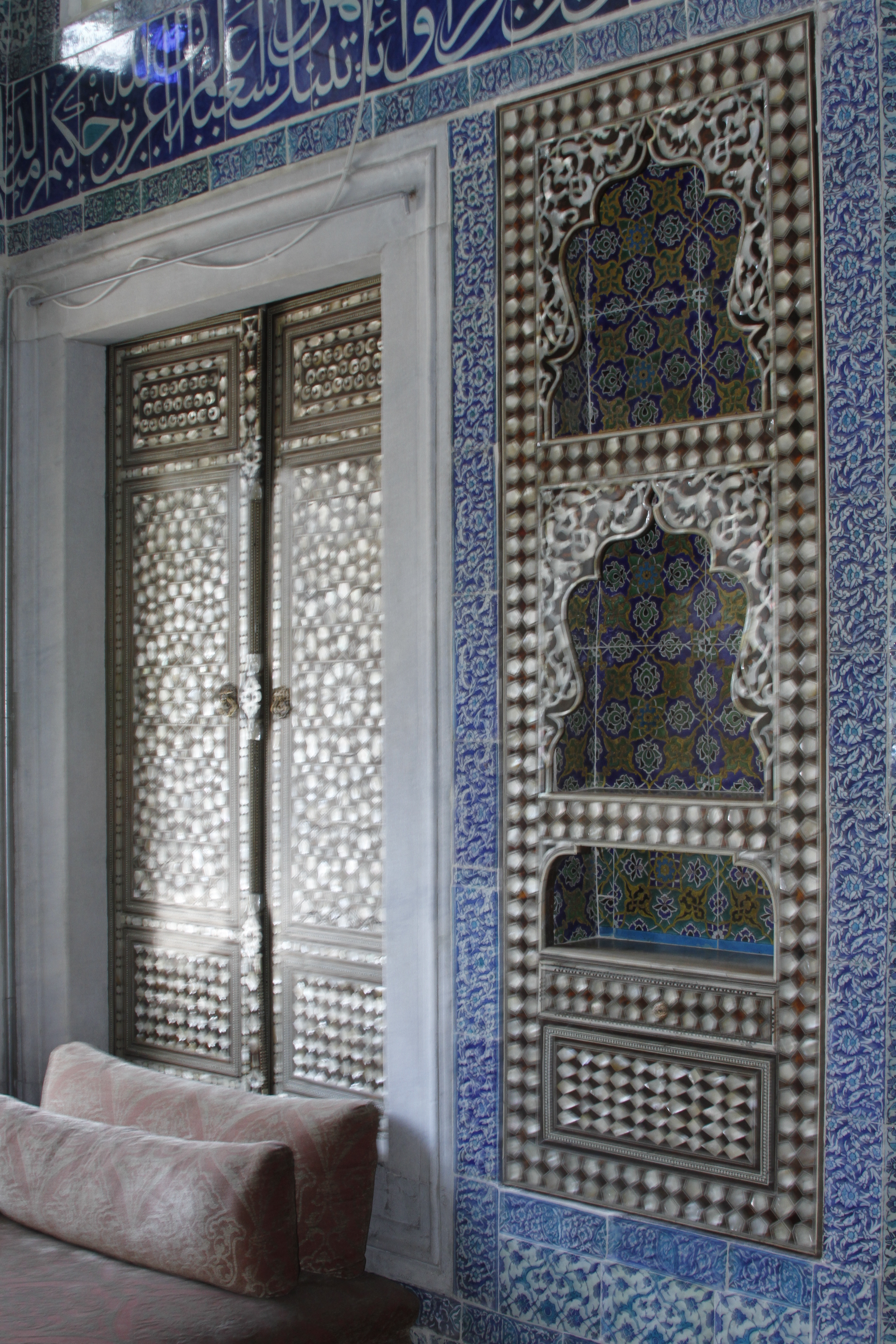 Interior do Quiosque de Bagdá no Palácio de Topkapi